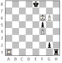 Les blancs jouent et gagnent. Une étude d'échecs de P. Stamma. Image faite par User:Mlavaud avec MS Paint.